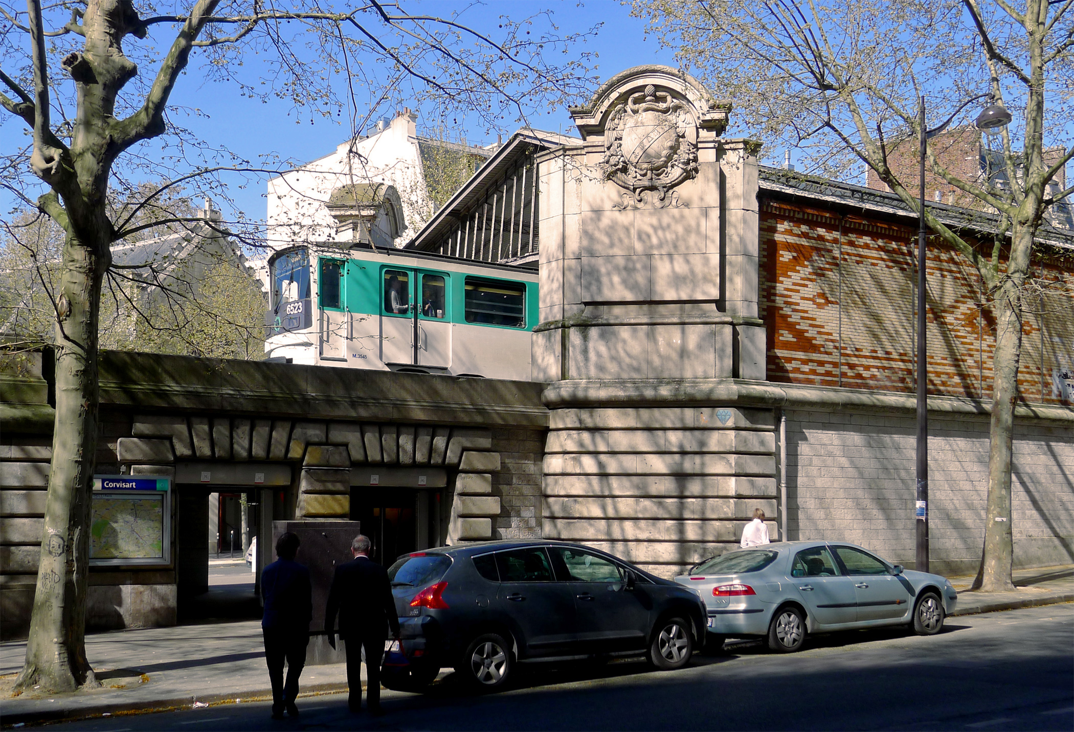 Boulevard Auguste-Blanqui (station de métro Corvisart) - Paris XIII